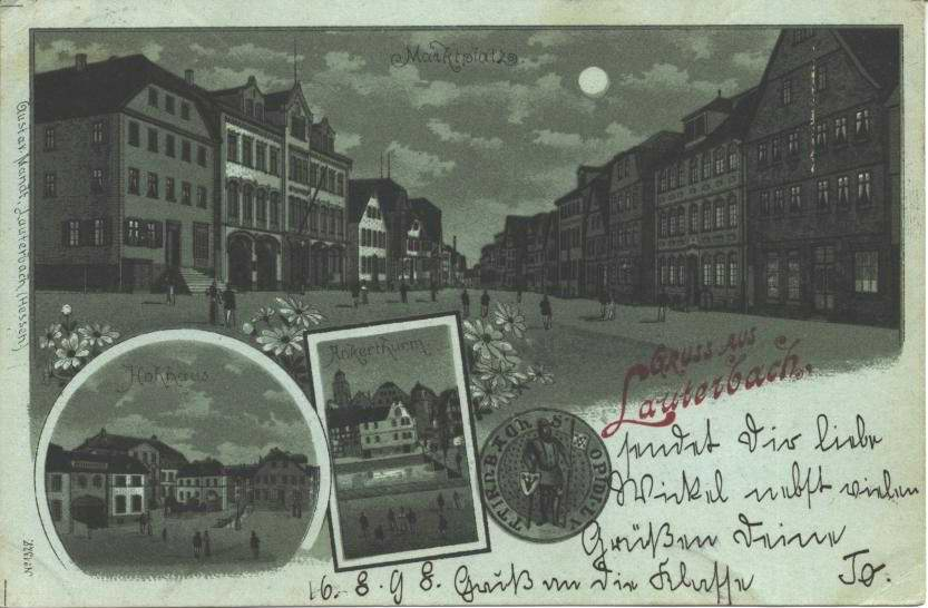 Ansichtskarte von Lauterbach Hessen. Gesendet am 16.8.1898